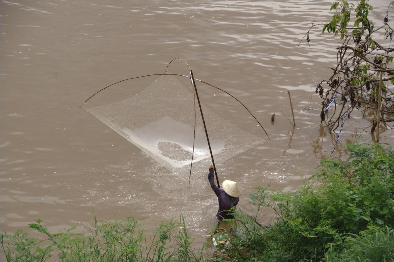 Tha Khaek, Laos